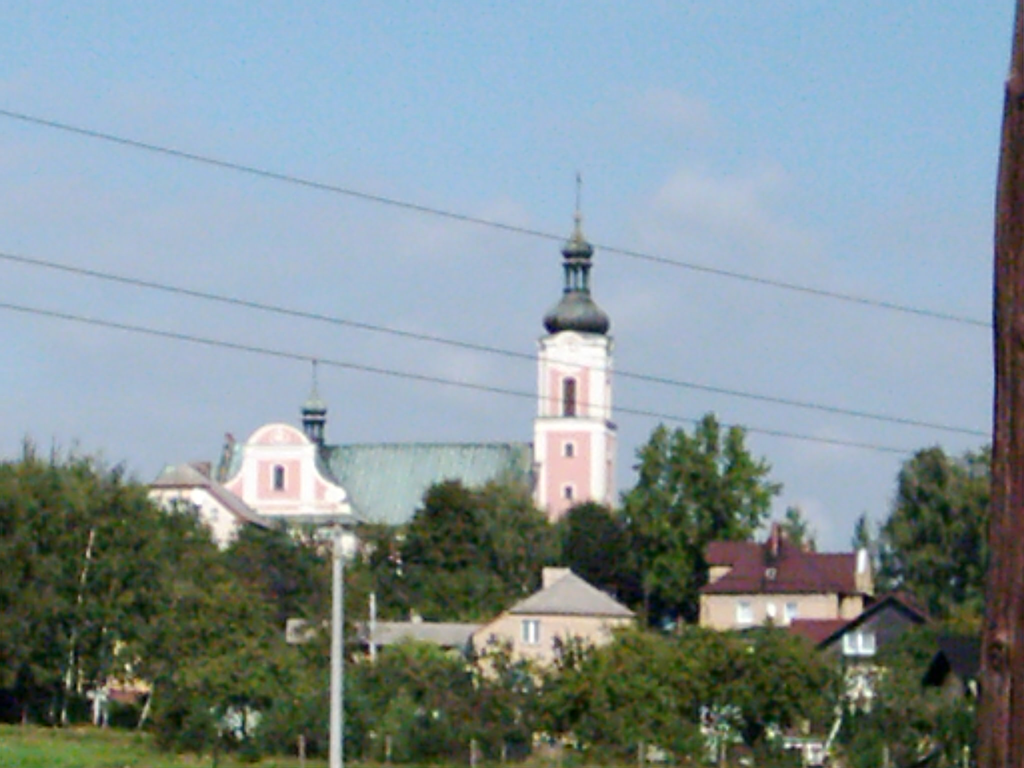 Wodzisław Śląski - Kościół P.W. Św. Krzyża w Wodzisławiu Śląskim-Zawadzie.